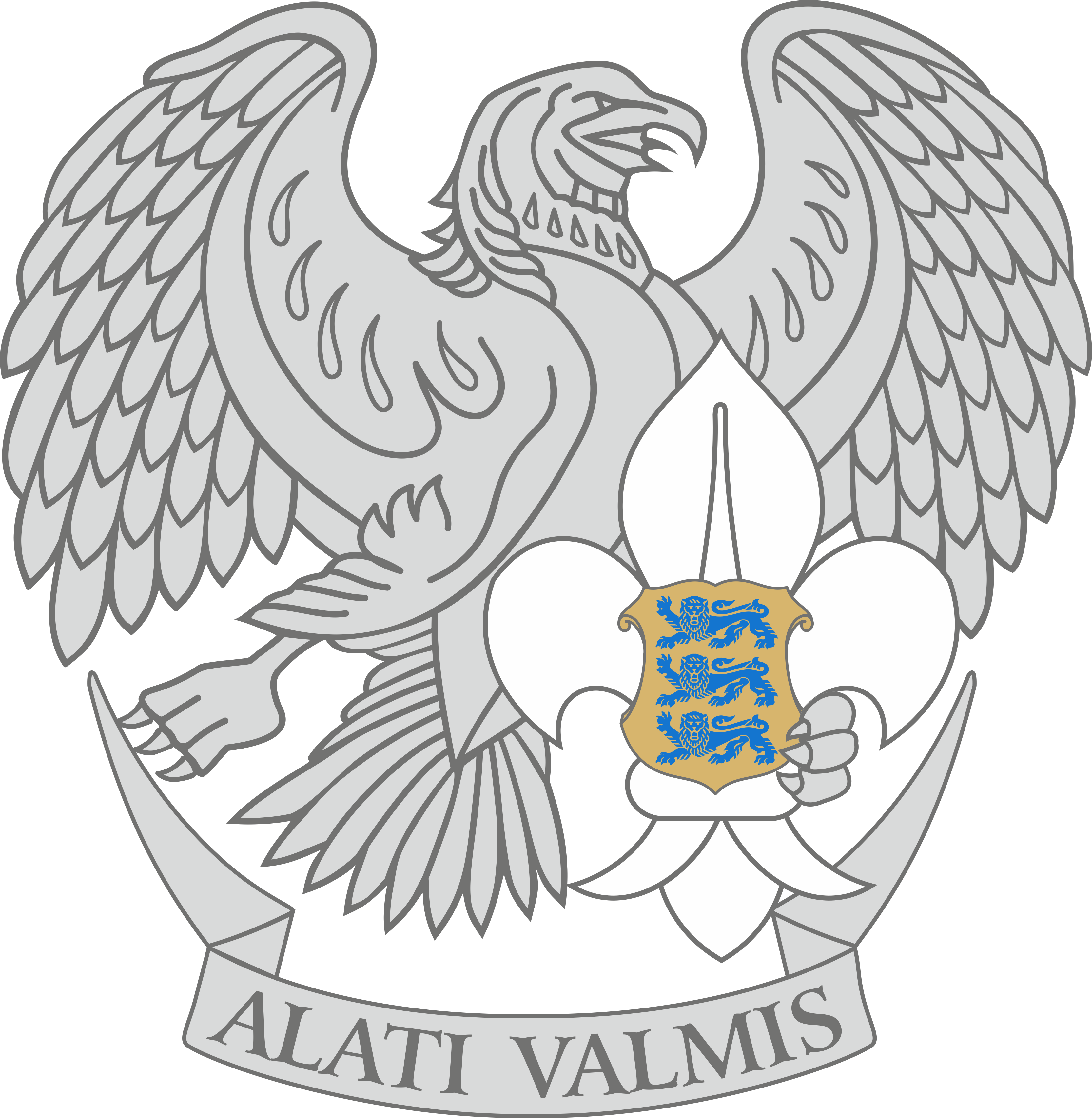 Noorte Kotkaste logo2